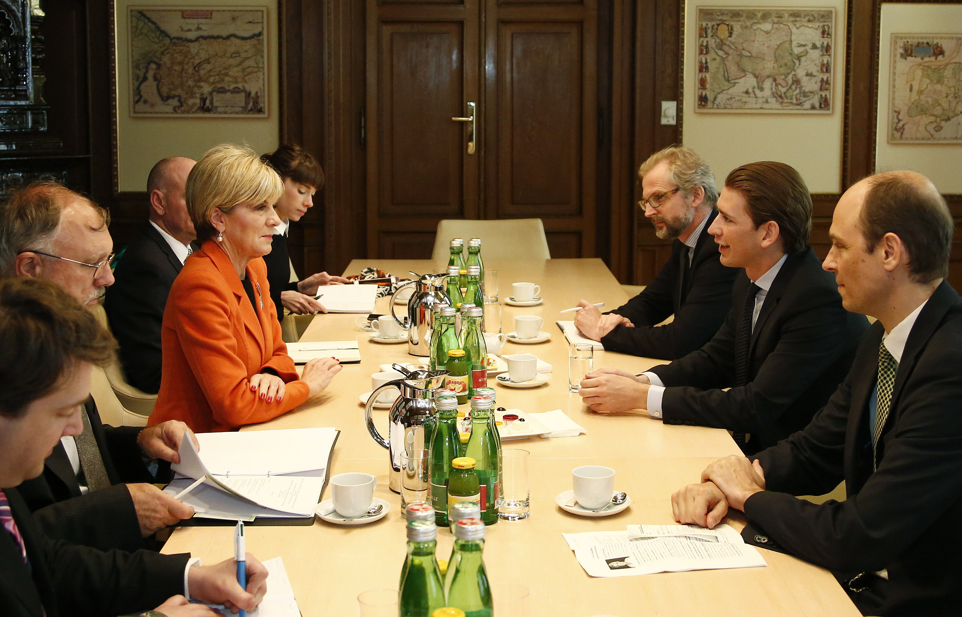 Australische Außenministern Julie Bishop und Österreichs Außenminister Sebastian Kurz zu Gesprächen anlässlich der Konferenz der International Syria Support Group (ISSG) in Wien.